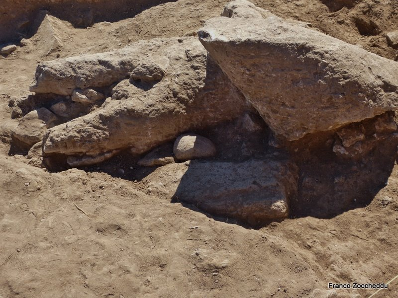 Nuovo "Pugile" di Monte Prama, al momento del rinvenimento, nel 2014